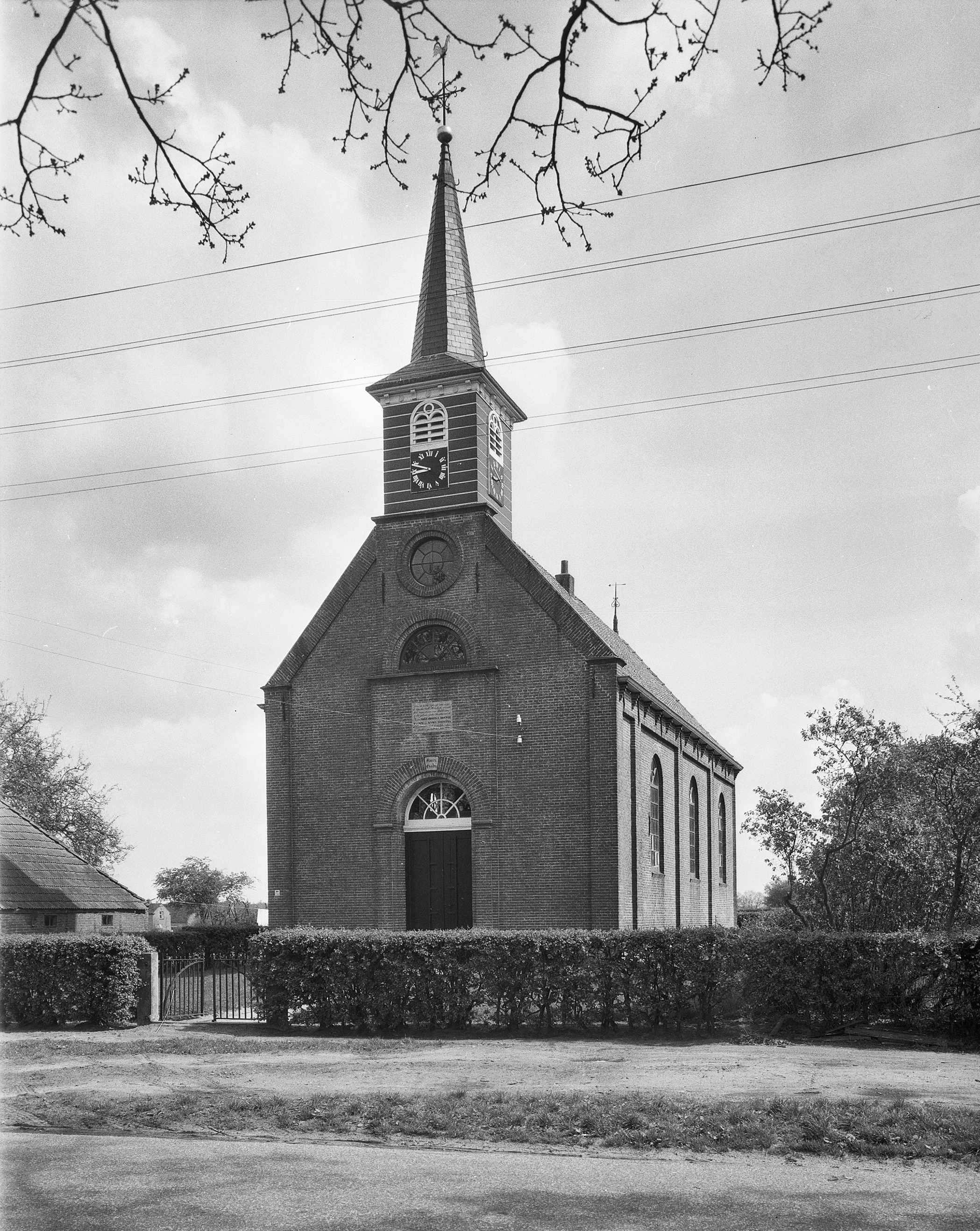 Nederlands Hervormde Kerk: exterieur naar het oosten